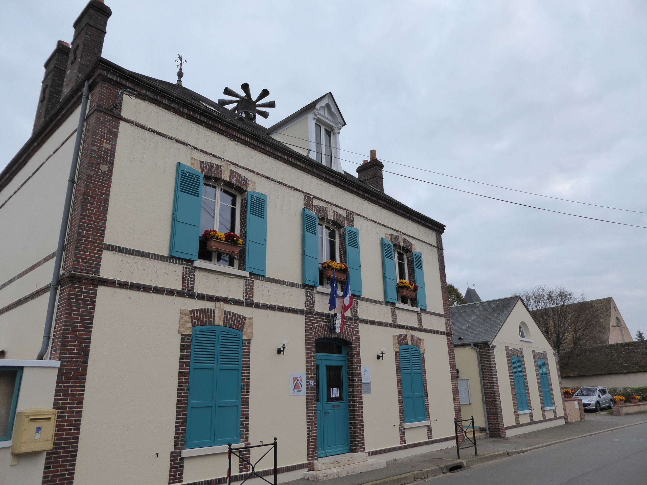 Mairie d'Amilly, Eure-et-Loir (France), l'église Saint-Pierre-et-Saint-Paul en arrière plan.